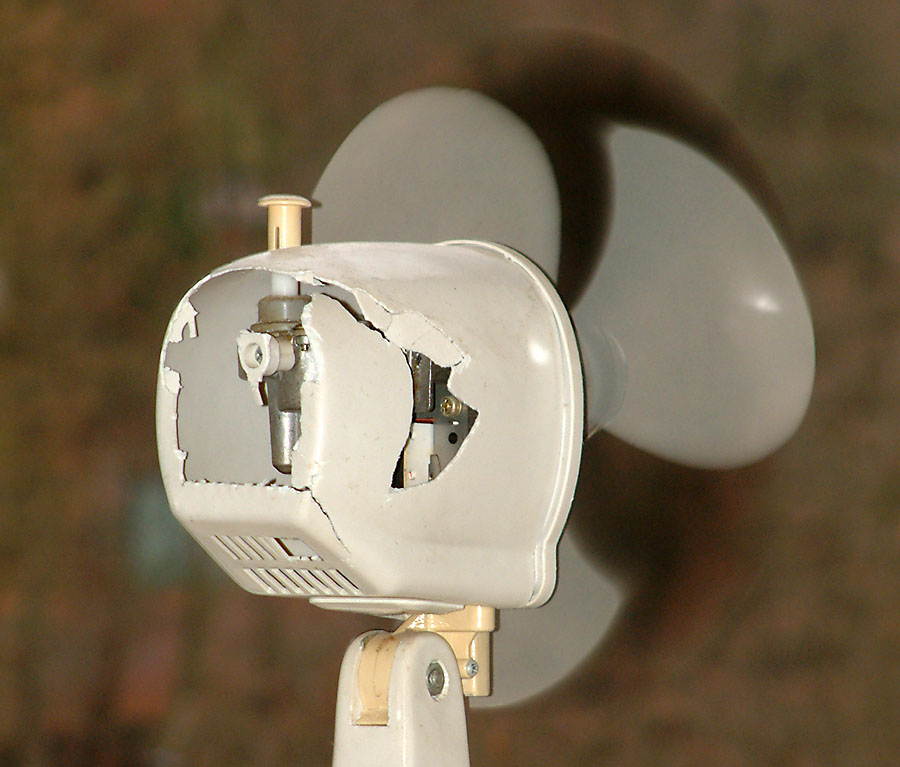 Kunststoffgehäuse eines älteren Ventilators mit zwei Schädigungstypen durch UV-Strahlung (Sonnenlicht): Versprödung des Gehäuses und Vergilbung von Scharnier und Verstellknopf